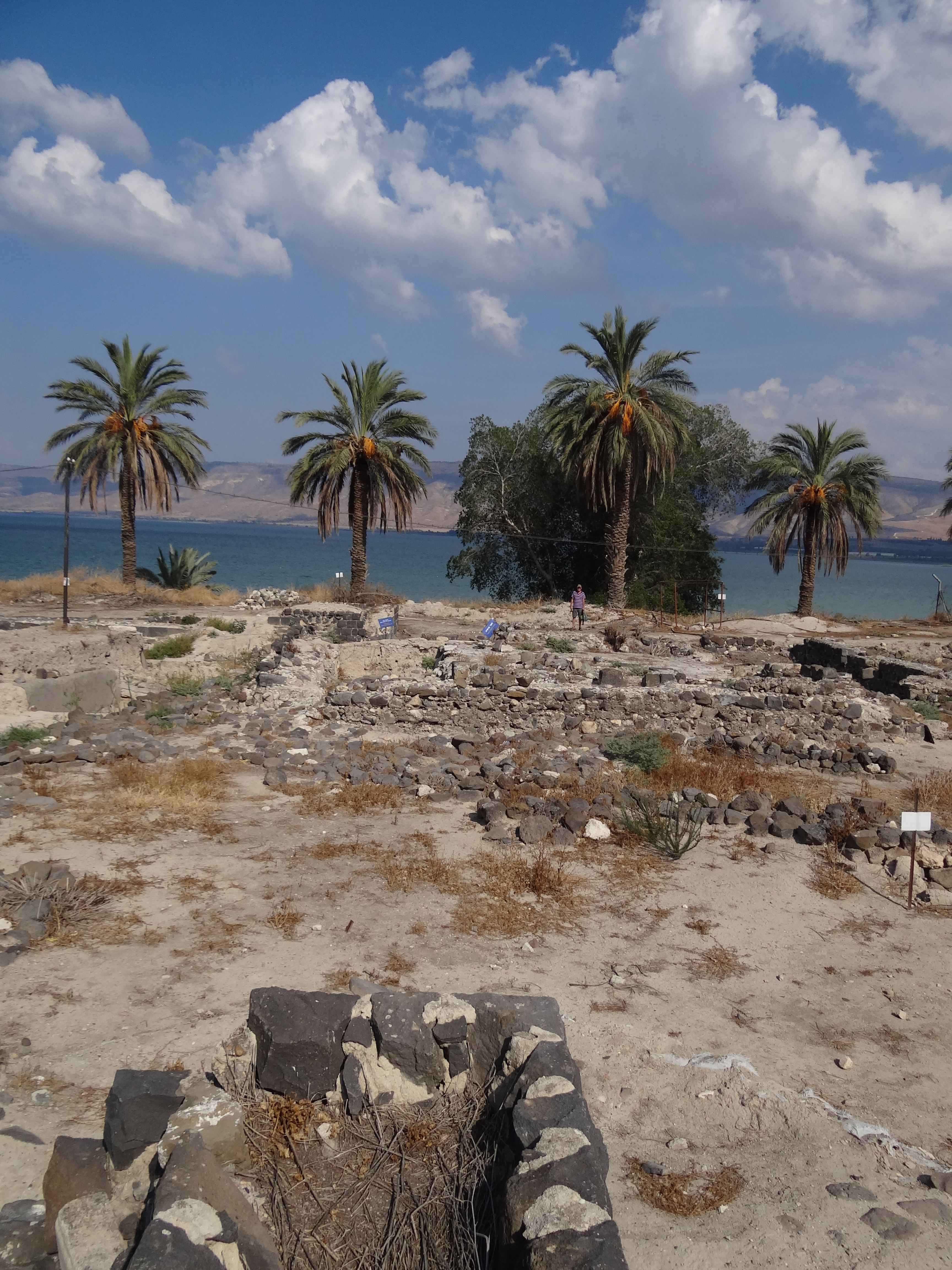 Tel Beth Yerah, "House of the Moon (god)") is a tell located on the southern shore of the Sea of Galilee in modern day Israel תל בית ירח הוא תל המצוי לחופה הדרומי מערבי של הכנרת בו נמצאים שרידי העיר העתיקה "בית ירח".